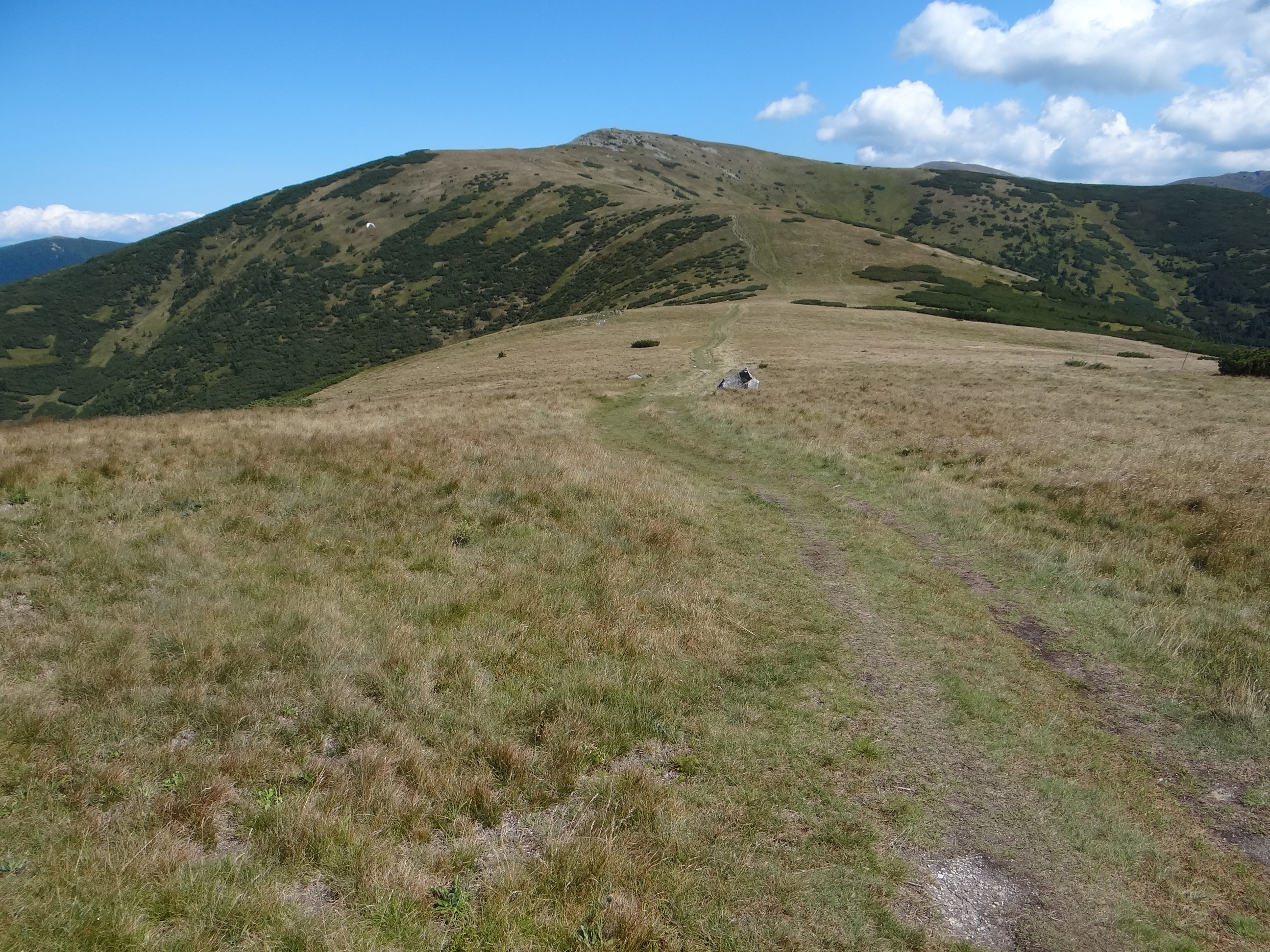 Ďurková